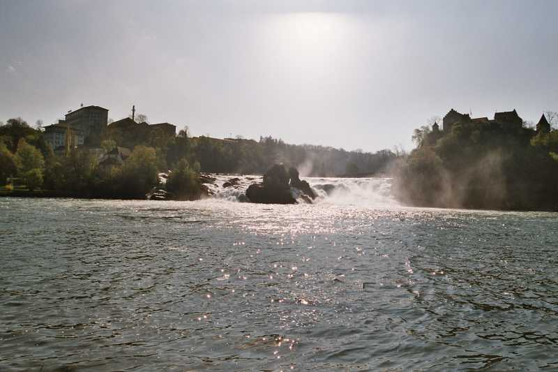 Der Rheinfall bei Schaffhausen